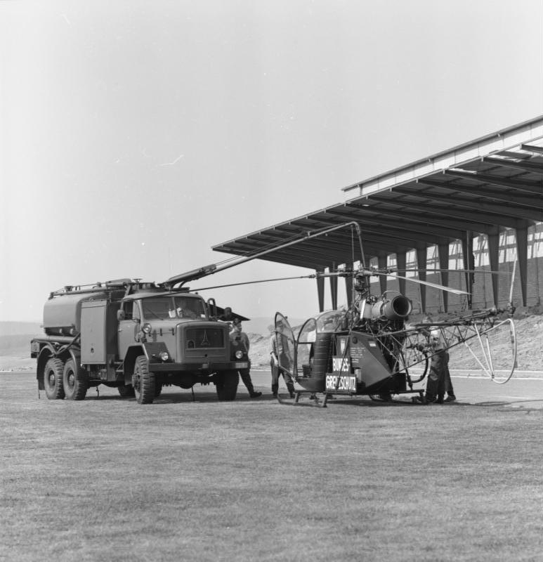 Zonengrenzfahrt, Bundespräsident Lübke BGS Bad Hersfeld